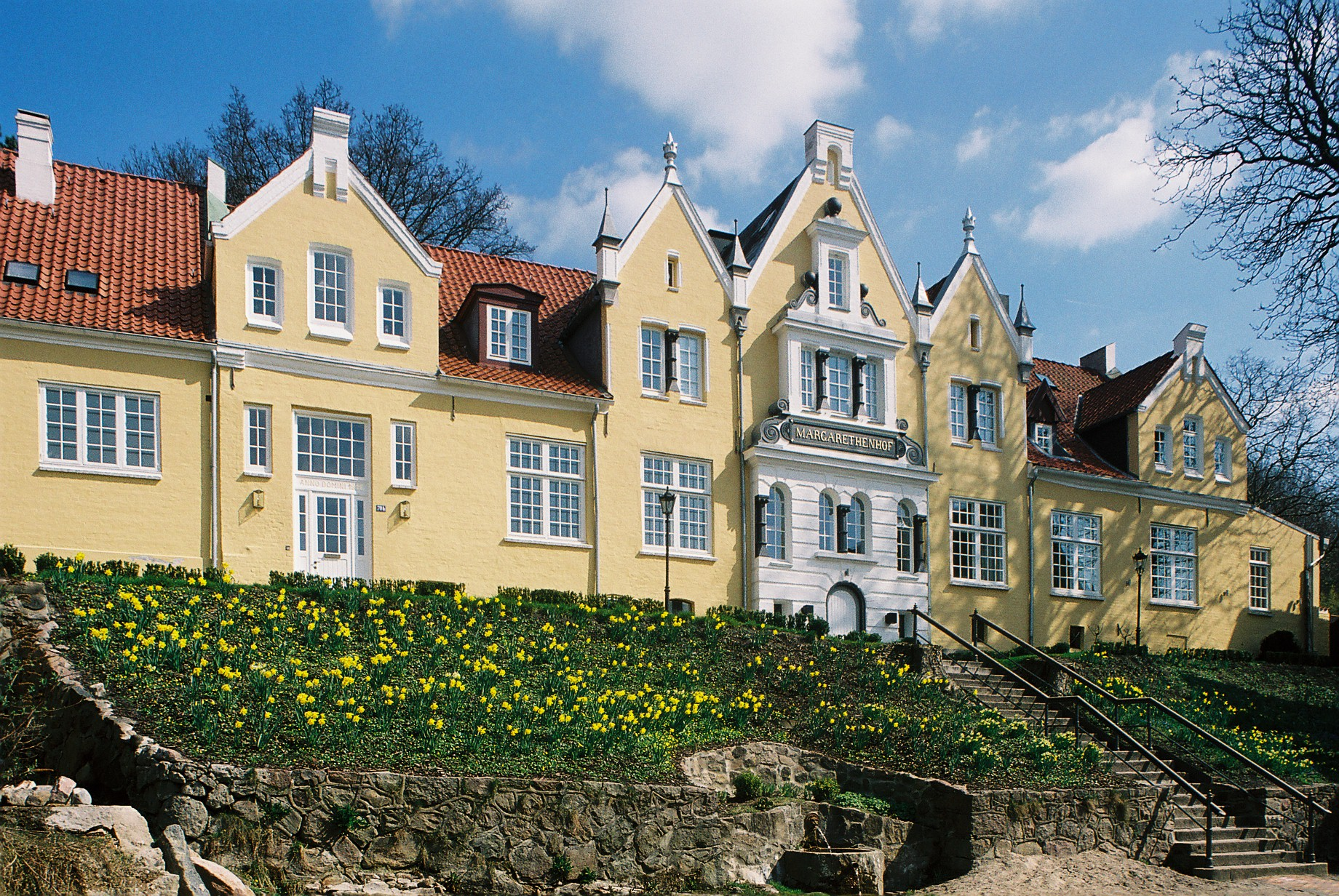 Flensburg, Johannisstraße 78 a/b, Margarethenhof, ehem. Herrenhaus. Nach Abschluss der aufwändigen Sanierung des um 1720 errichteten und 1882 sowie 1911 umgebauten Wohnhauses, Ansicht von Westen.